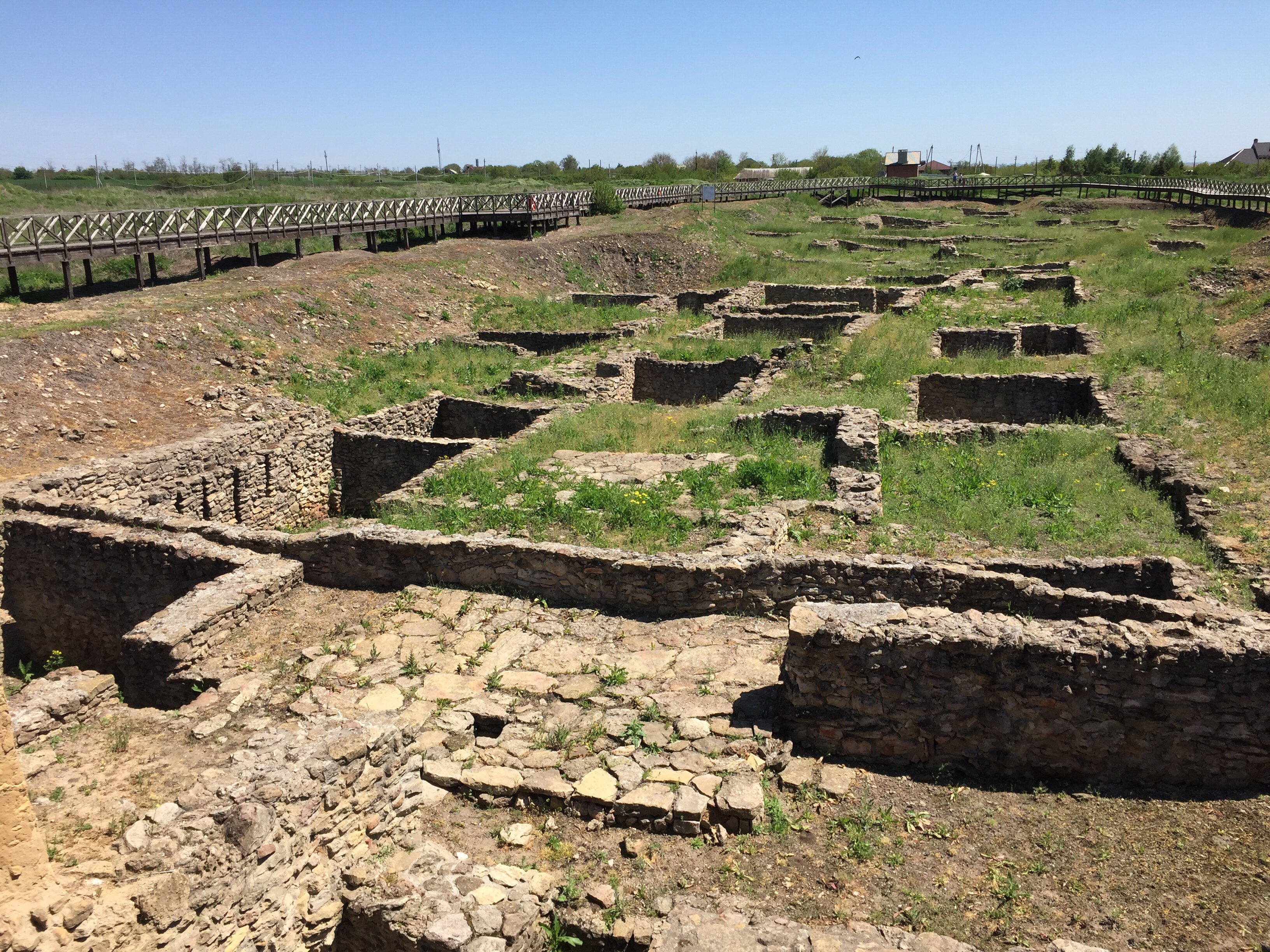 Танаис, археологический музей-заповедник: Недвиговка, Мясниковский район, Ростовская область This image is related to the protected area of Russia number 6100081